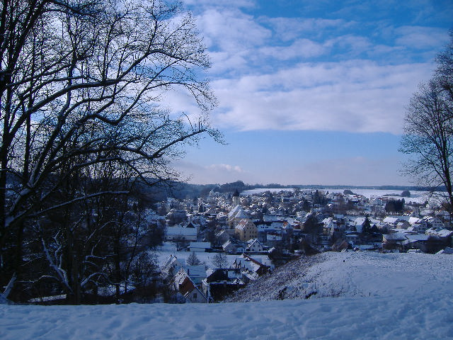 Welden